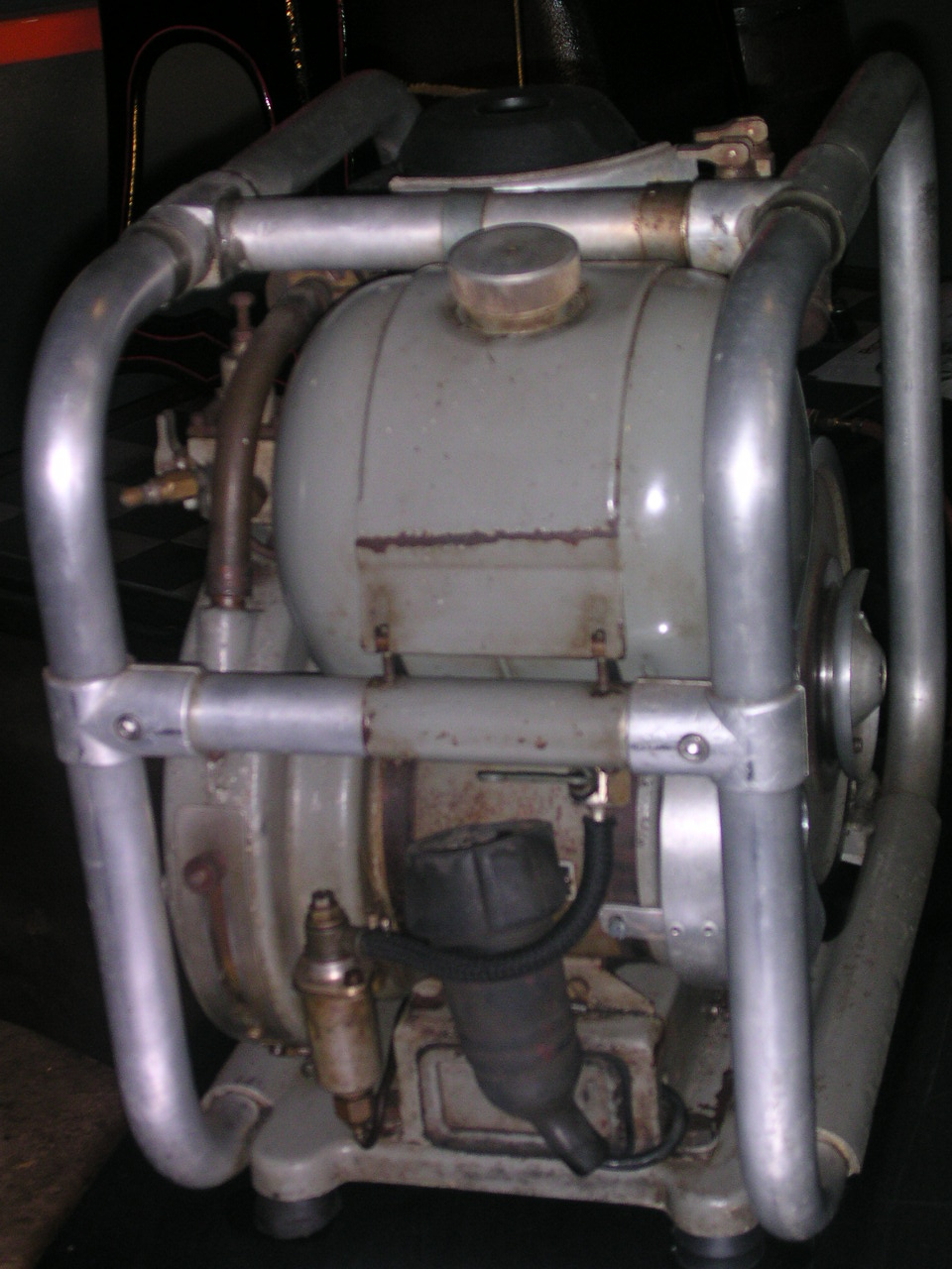 Kerkrade, Industrion, Philips-Stirlingmotor mit 180 W, Baujahr 1953